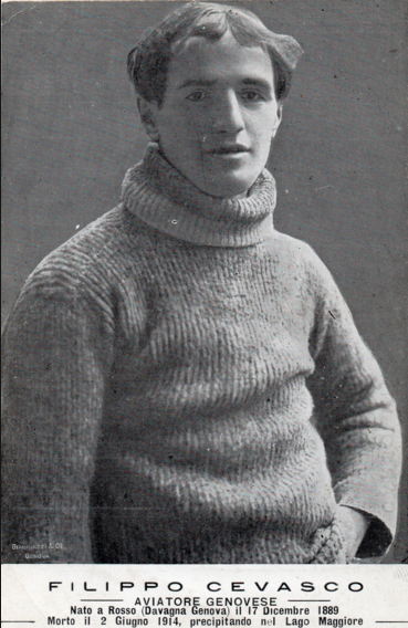 Filippo Cevasco (Rosso, 17 dicembre 1889 – Lago Maggiore, 2 giugno 1914) è stato un aviatore italiano, pilota collaudatore della Gabardini e detentore di alcuni primati mondiali negli anni dieci del XX secolo.